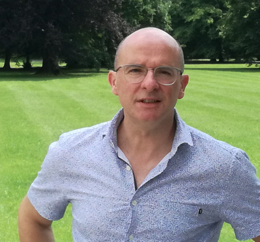 Portraitfoto von Klaus Thomas Steindl